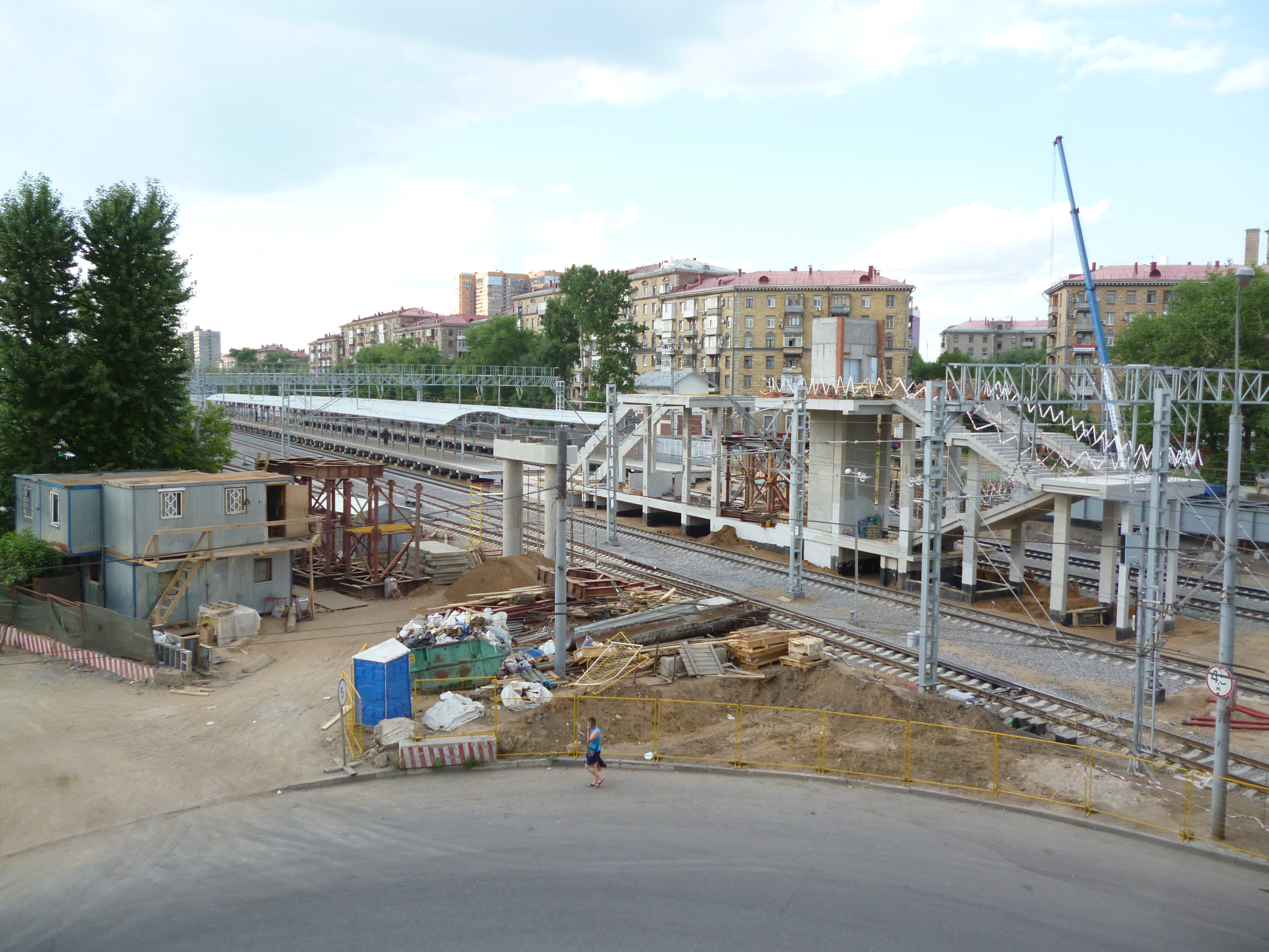 Строящаяся платформа Ходынка Московской кольцевой железной дороги.